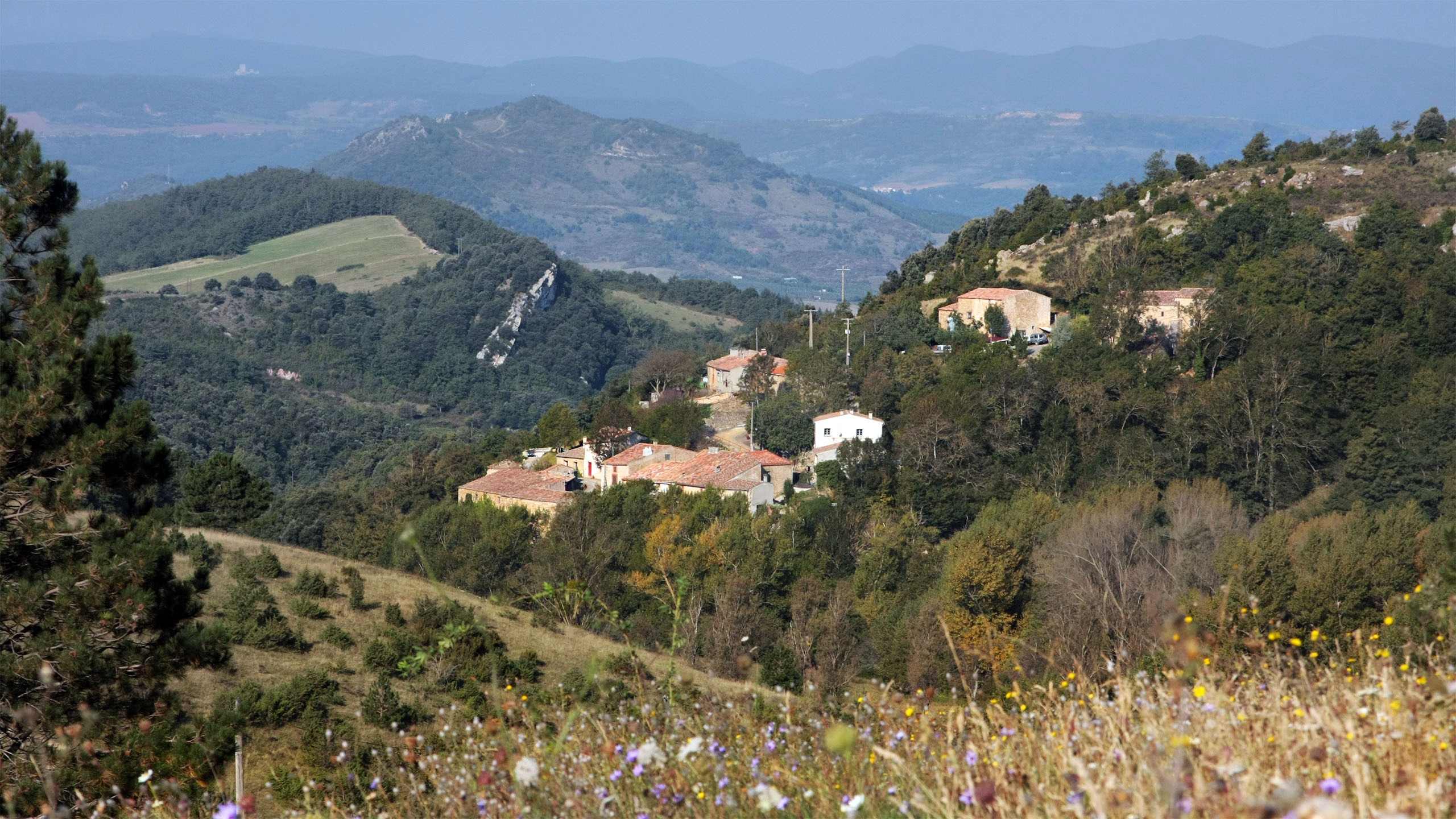 Vue générale